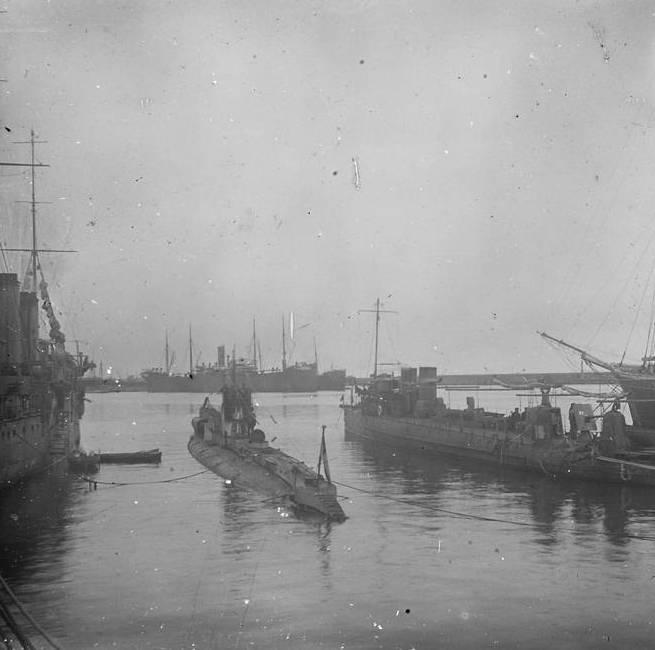 Submarí alemany U - 74 al port de Barcelona , El. Josep Salvany i Blanch (1918)